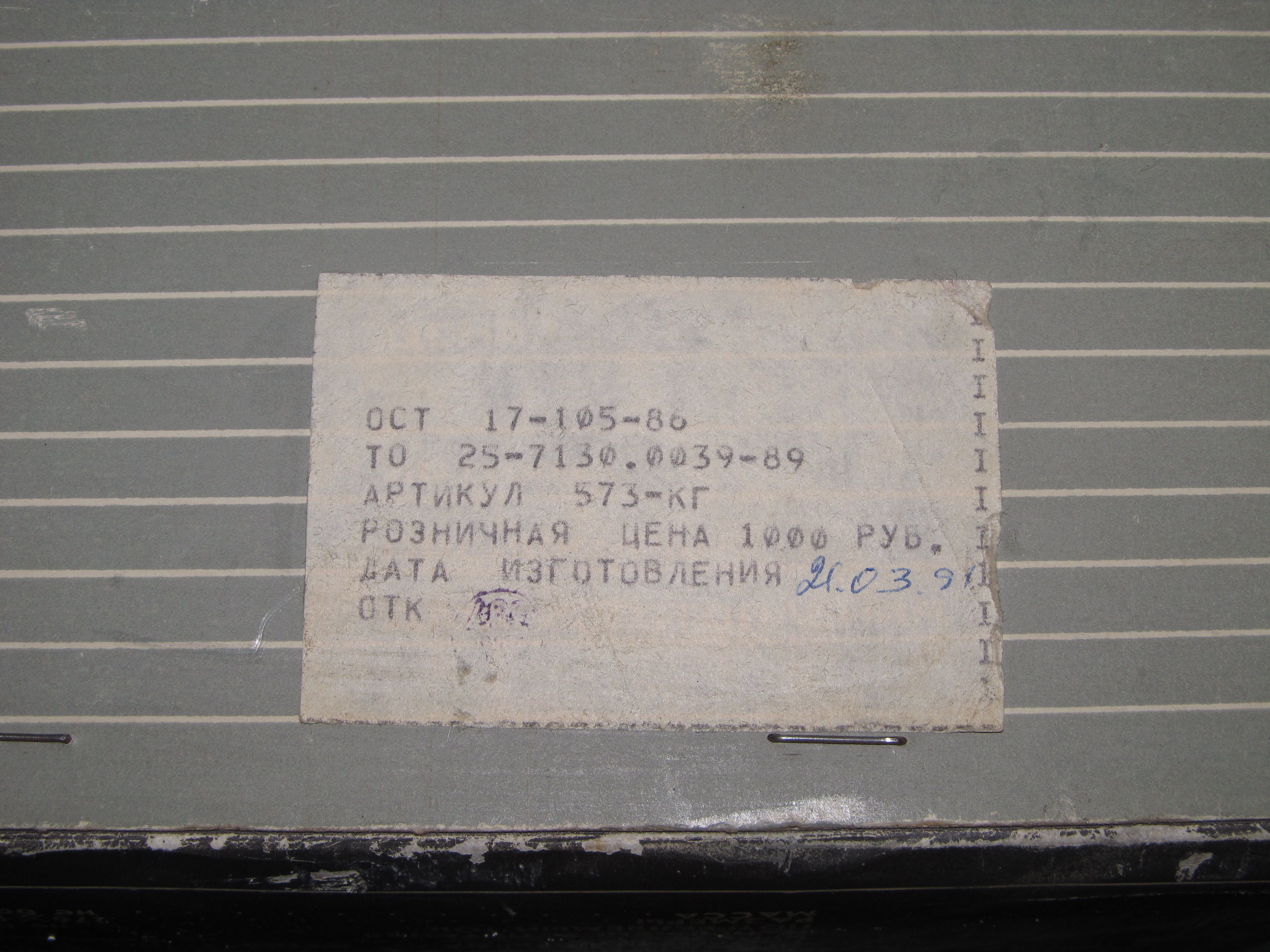 Заводская этикетка на коробке от "Поиска", с ценой и датой изготовления.